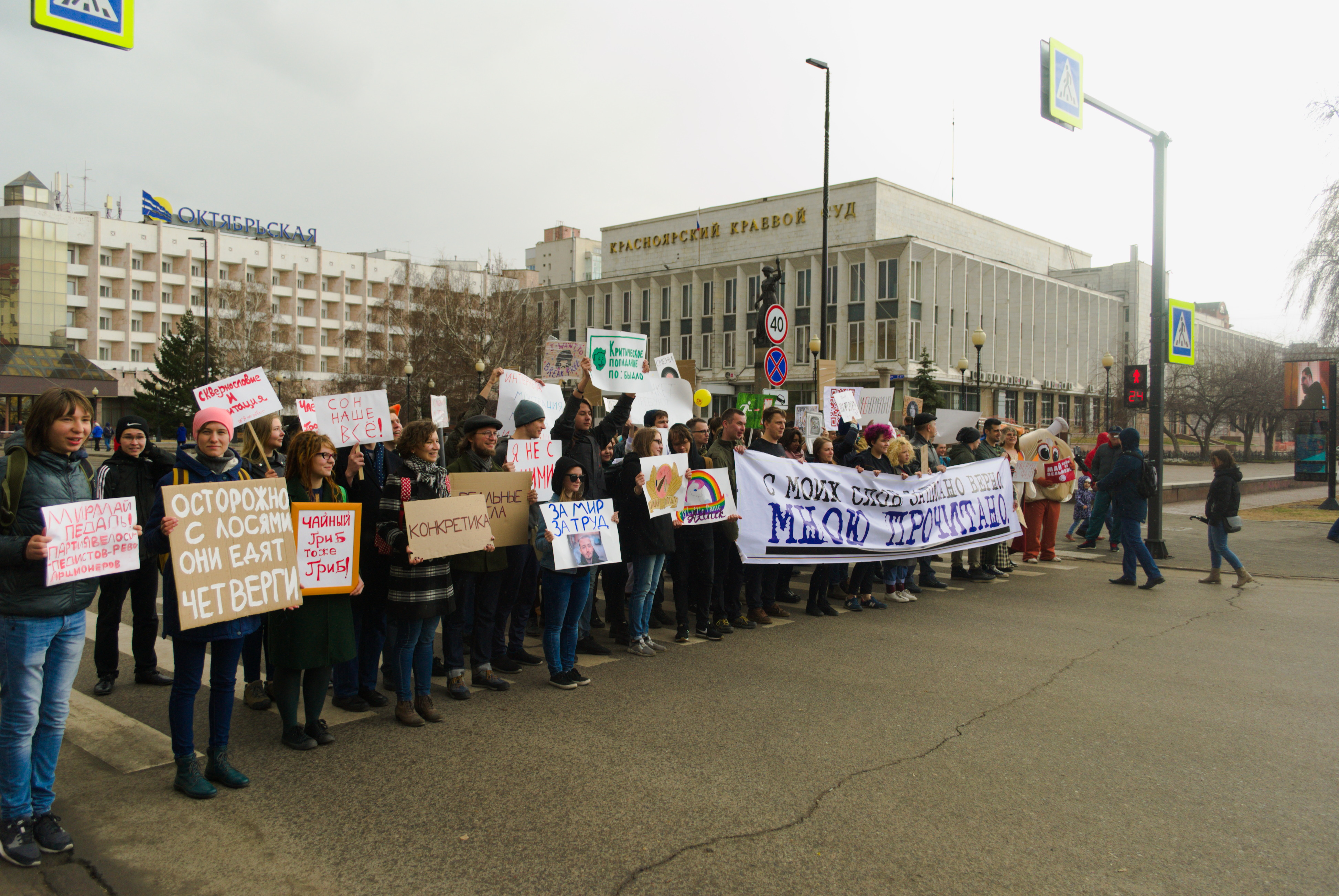 Монстрация в городе Красноярске (2019 год, проспект Мира у площади Правосудия)